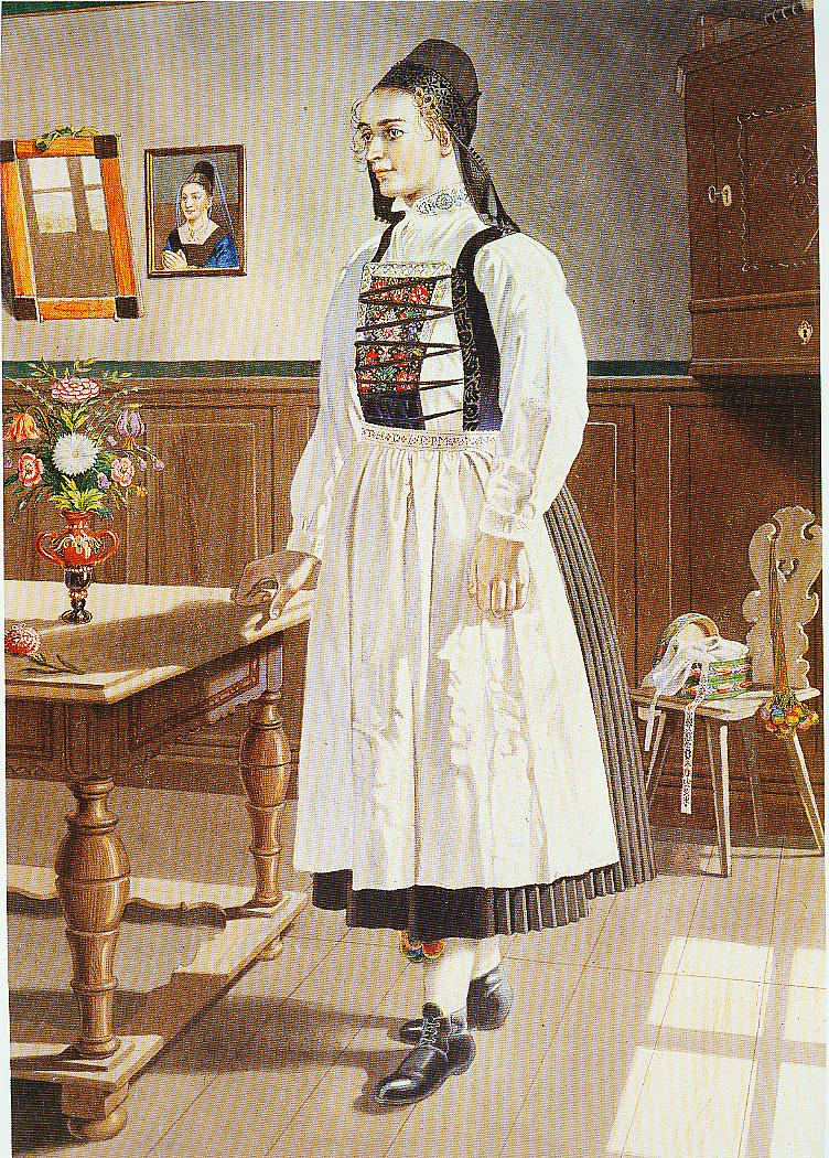 Scan einer Abbildung der Hinterländer Tracht aus Steinperf (ehem. Obergericht Breidenbacher Grund)